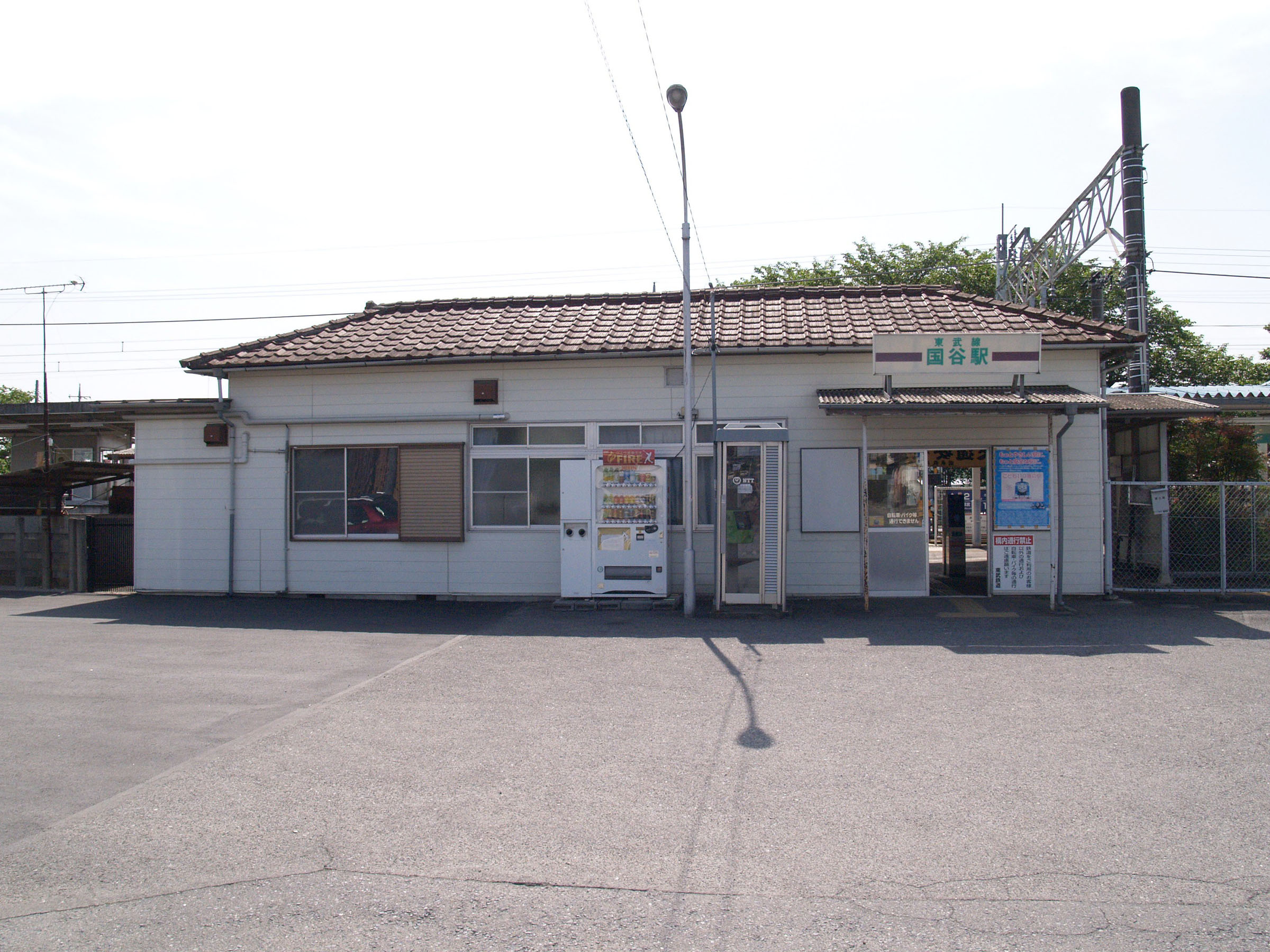 国谷駅